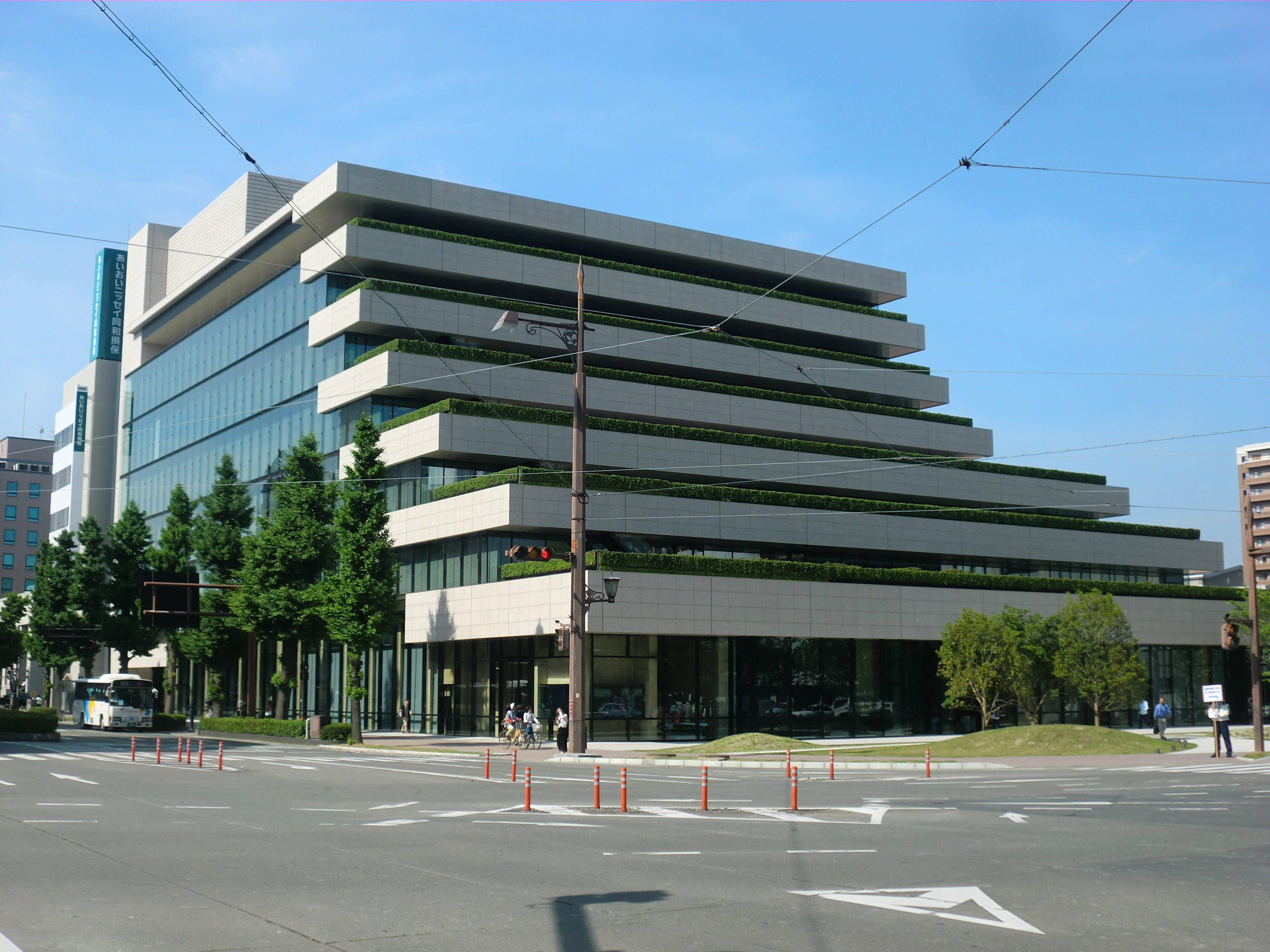 熊本市にある肥後銀行本店